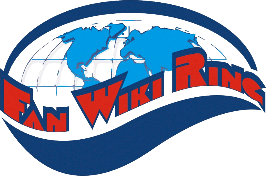 Logo des Fanwiki-Rings